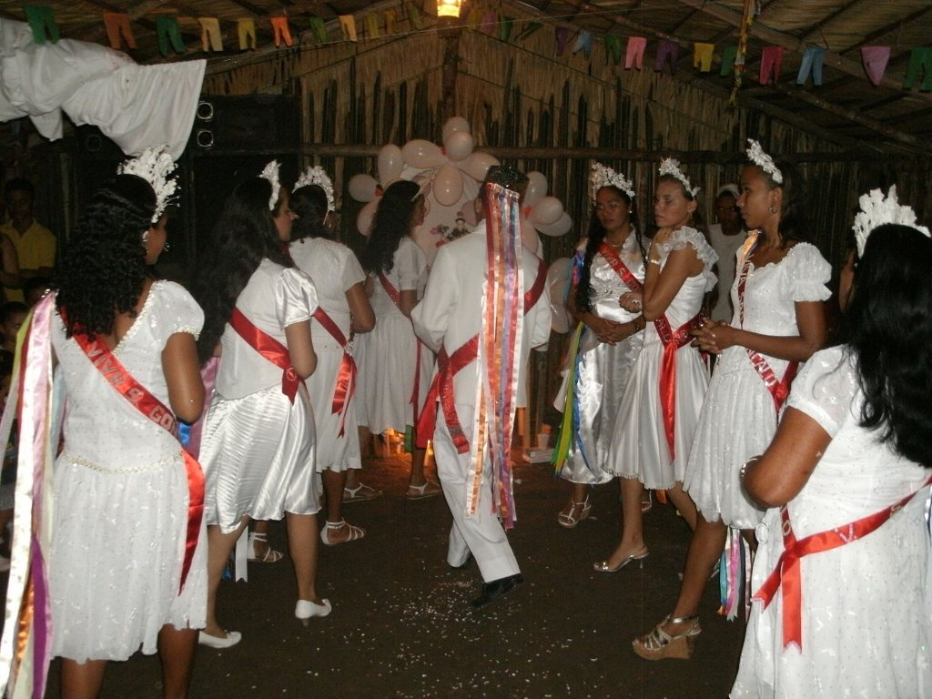 Baile Religioso de São Gonçalo